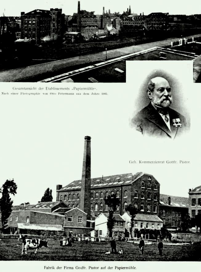 Tuchfabrik Pastor/Neuwerk um 1906 sowie Porträt Gottfried Pastor